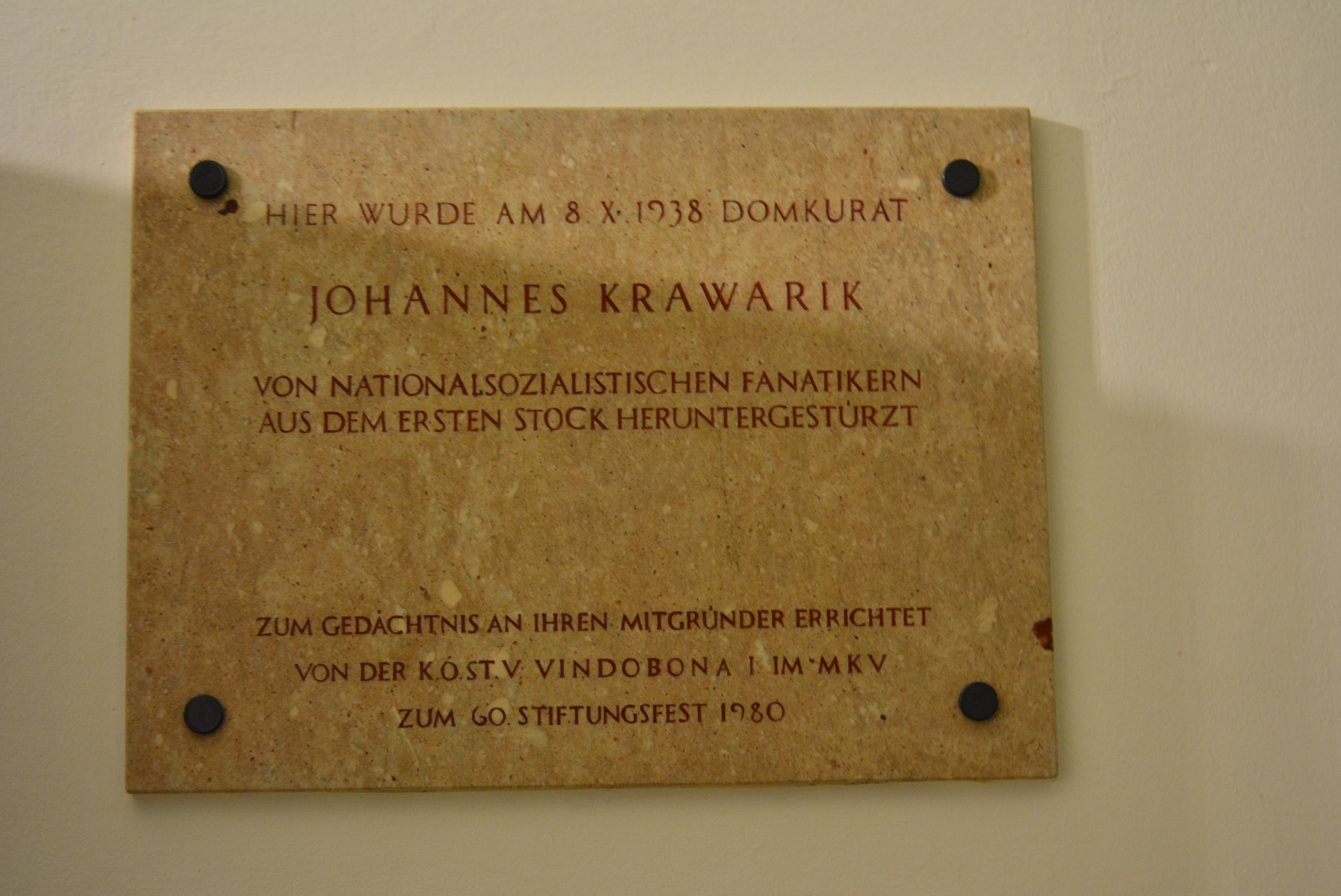 Gedenktafel für Josef Krawarik (Wien, Stephansplatz 3)